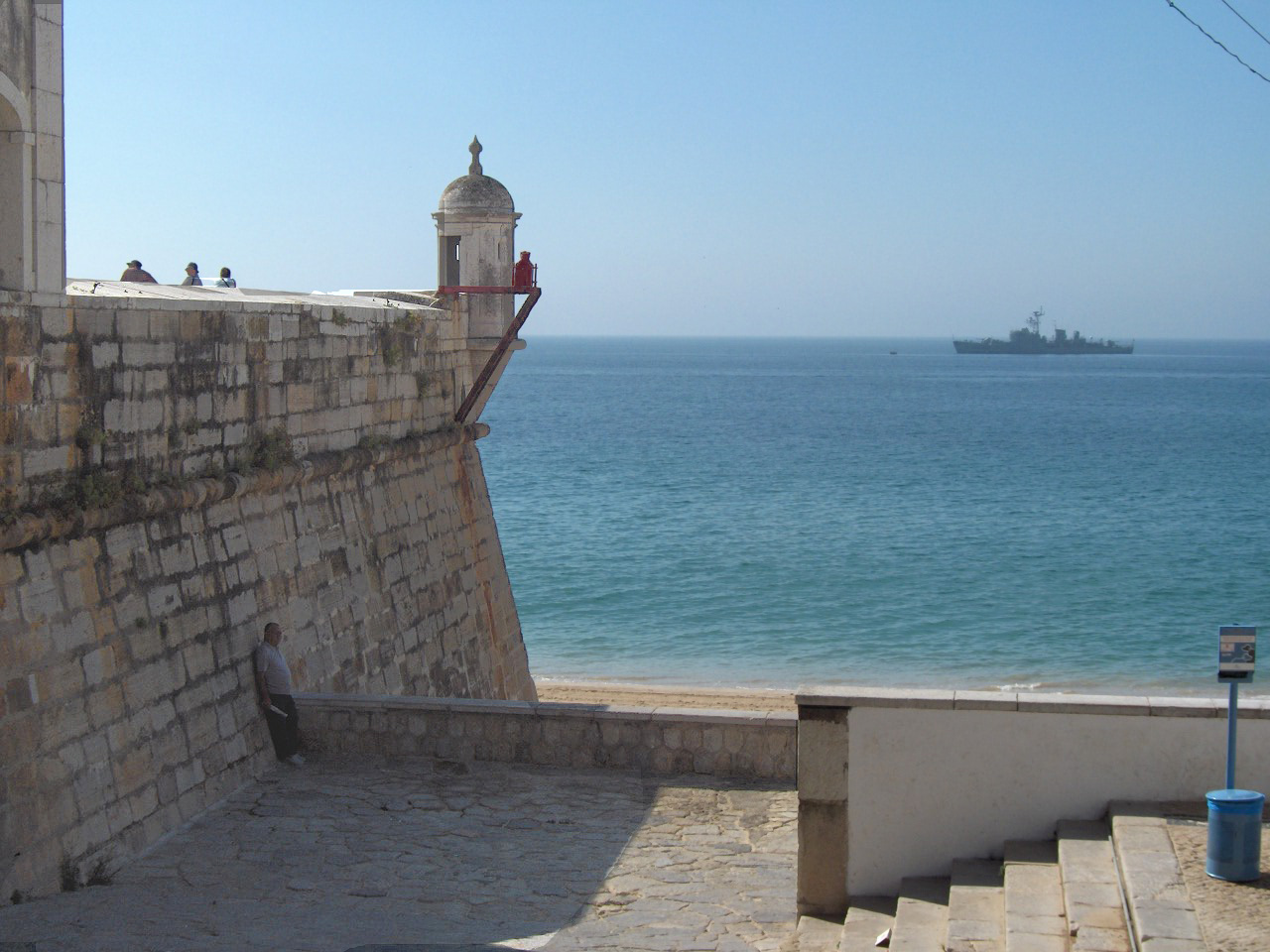 Forte de Santiago de Sesimbra, Portugal